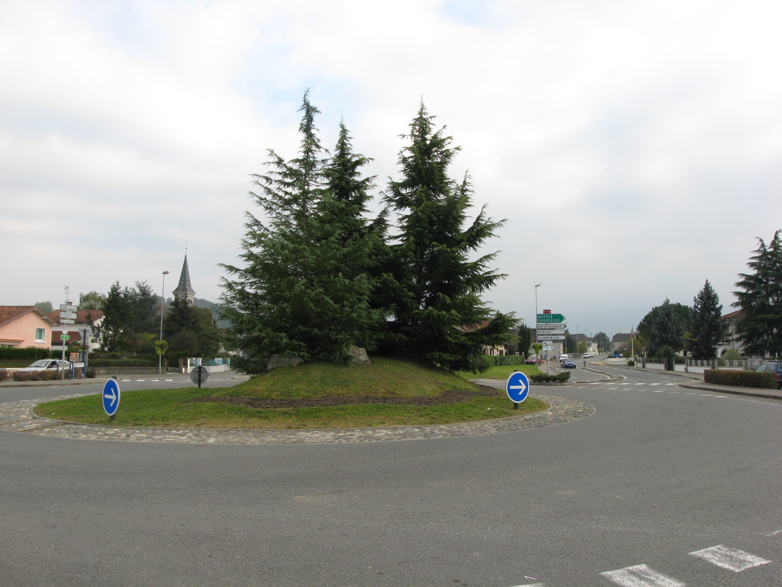 Route du col du Somport depuis le village de Bidos (Pyrénées Atlantiques) Pyrénées).